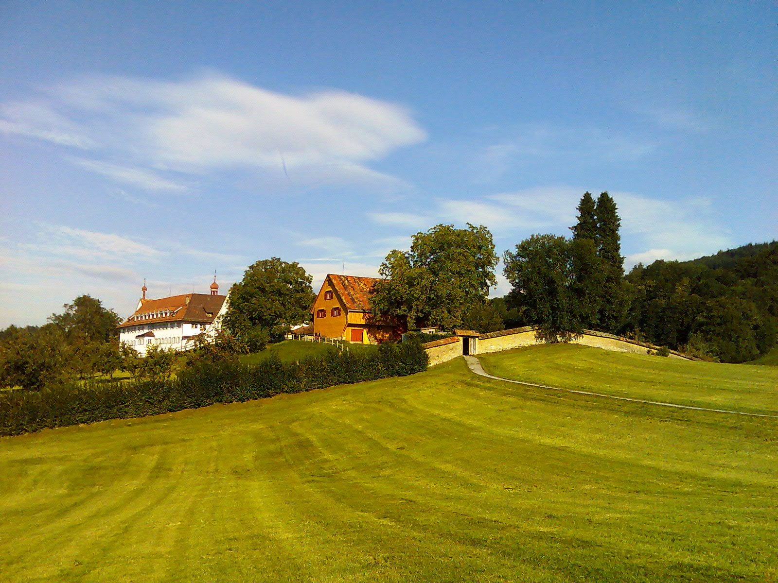 Die Kloster-Anlage von Notkersegg vom Scheitlinsbüchel aus gesehen. Ein restlicher Teil der ehemaligen Klostermauer (Umfriedung) ist vor dem Landwirtschaftsgebäude zu sehen und hinten links die Klosterkirche.